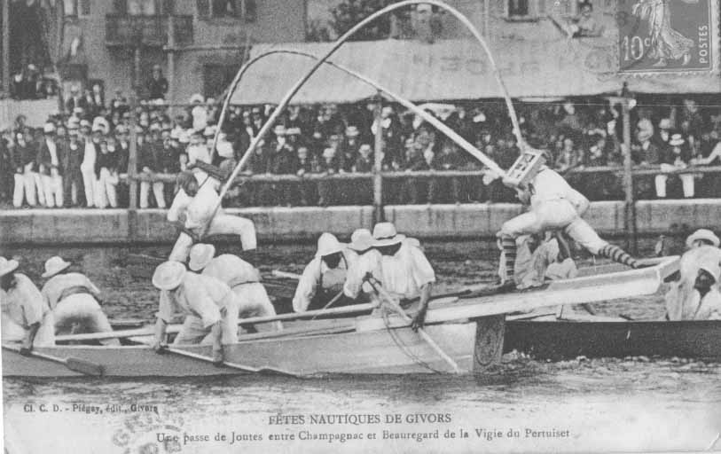 Joute Givordine entre 1900 et 1950